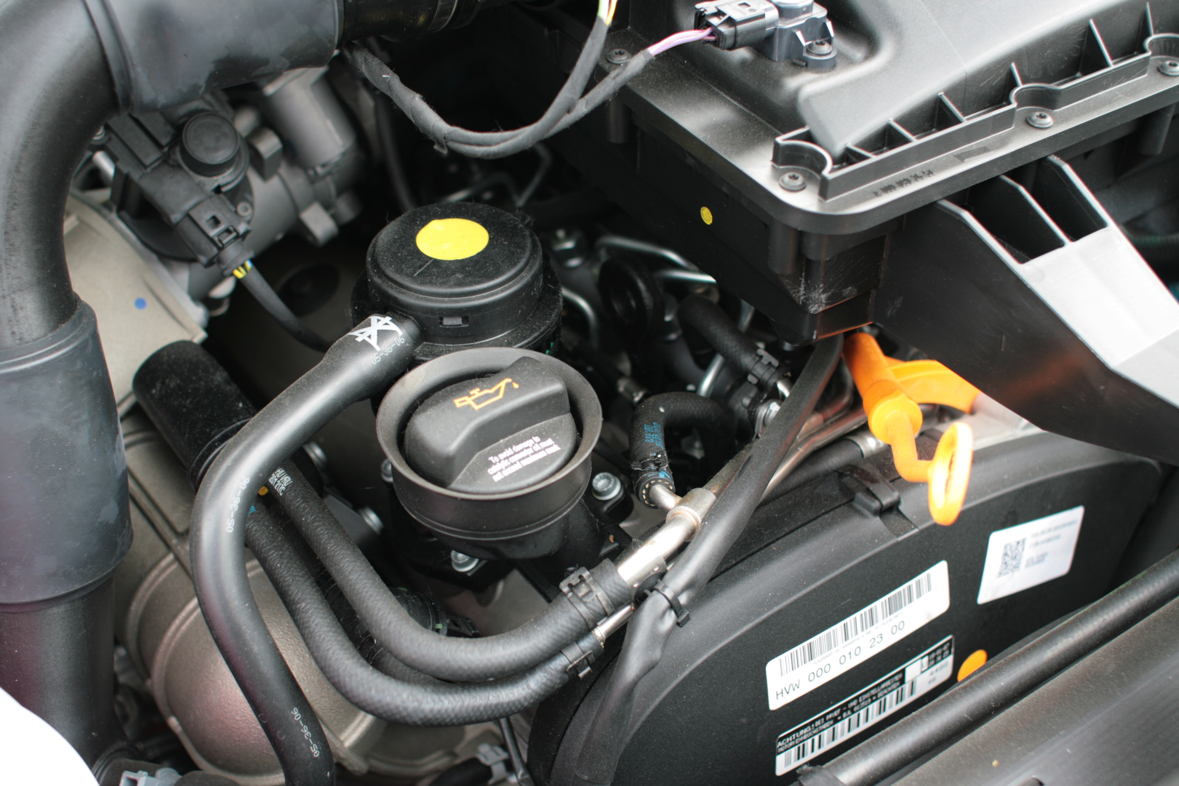 Crafter Motorraum